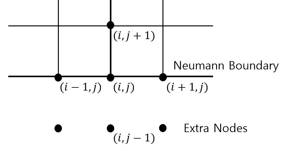 노이만 경계조건과 추가 격자점을 보여준다. 그리고 각 격자점에 상대 위치를 표시해주고 있다.